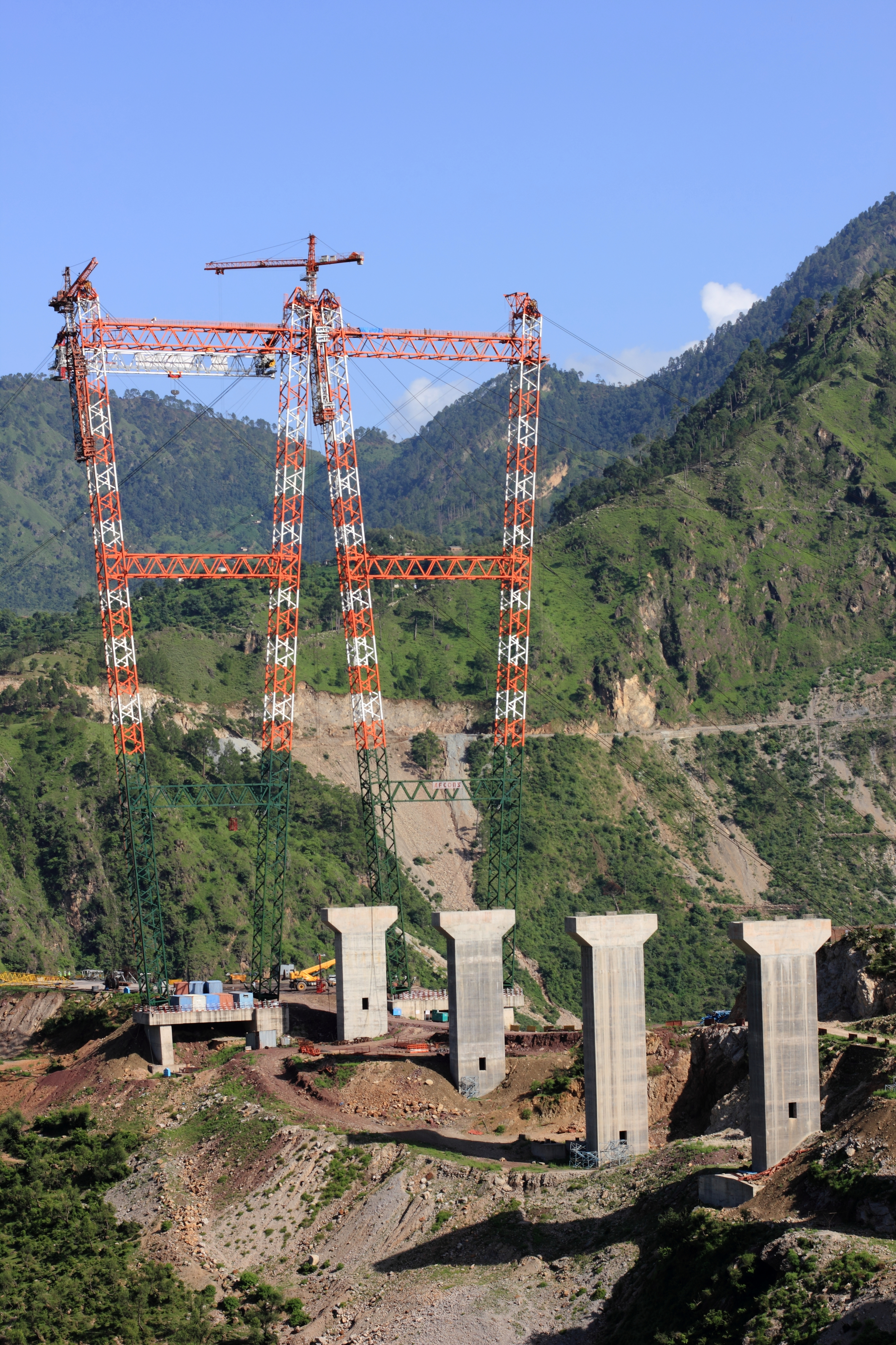 Chenab railway bridge